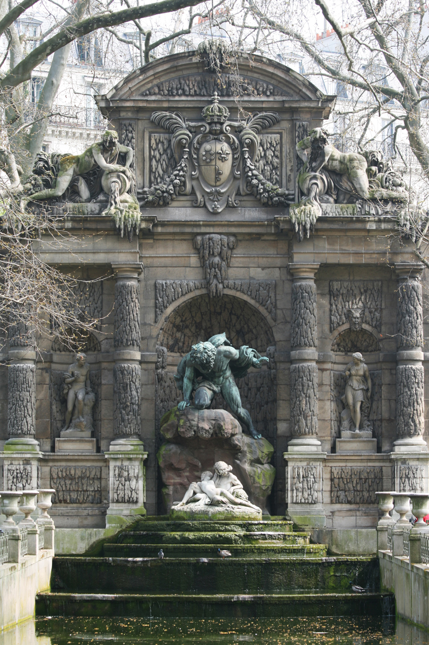 Fontaine Medicis dans le jardin du Luxembourg